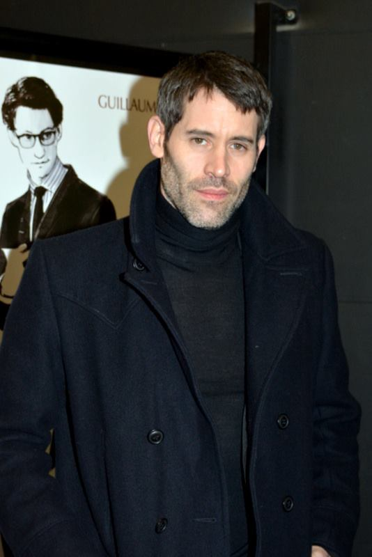 Jalil Lespert à l'avant-première du film "Yves Saint Laurent"